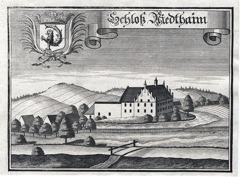 Deitsch: Schloss Riedersheim; Kupferstich von Michael Wening